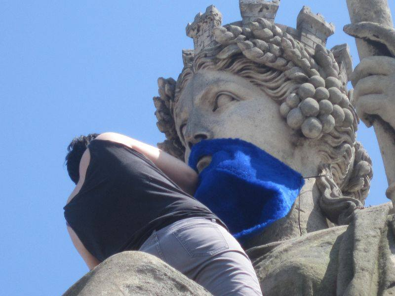 « Tant que la France sera dirigée par les hommes, une barbe poussera aux effigies de la République » (groupe d’action féministe La Barbe, fête nationale, Paris, place de la Nation, juillet 2013, photo La Barbe.)